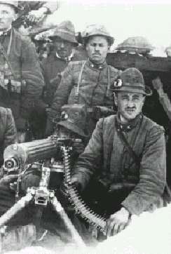 Foto scattata durante la prima guerra mondiale il cui copyright è ormai scaduto